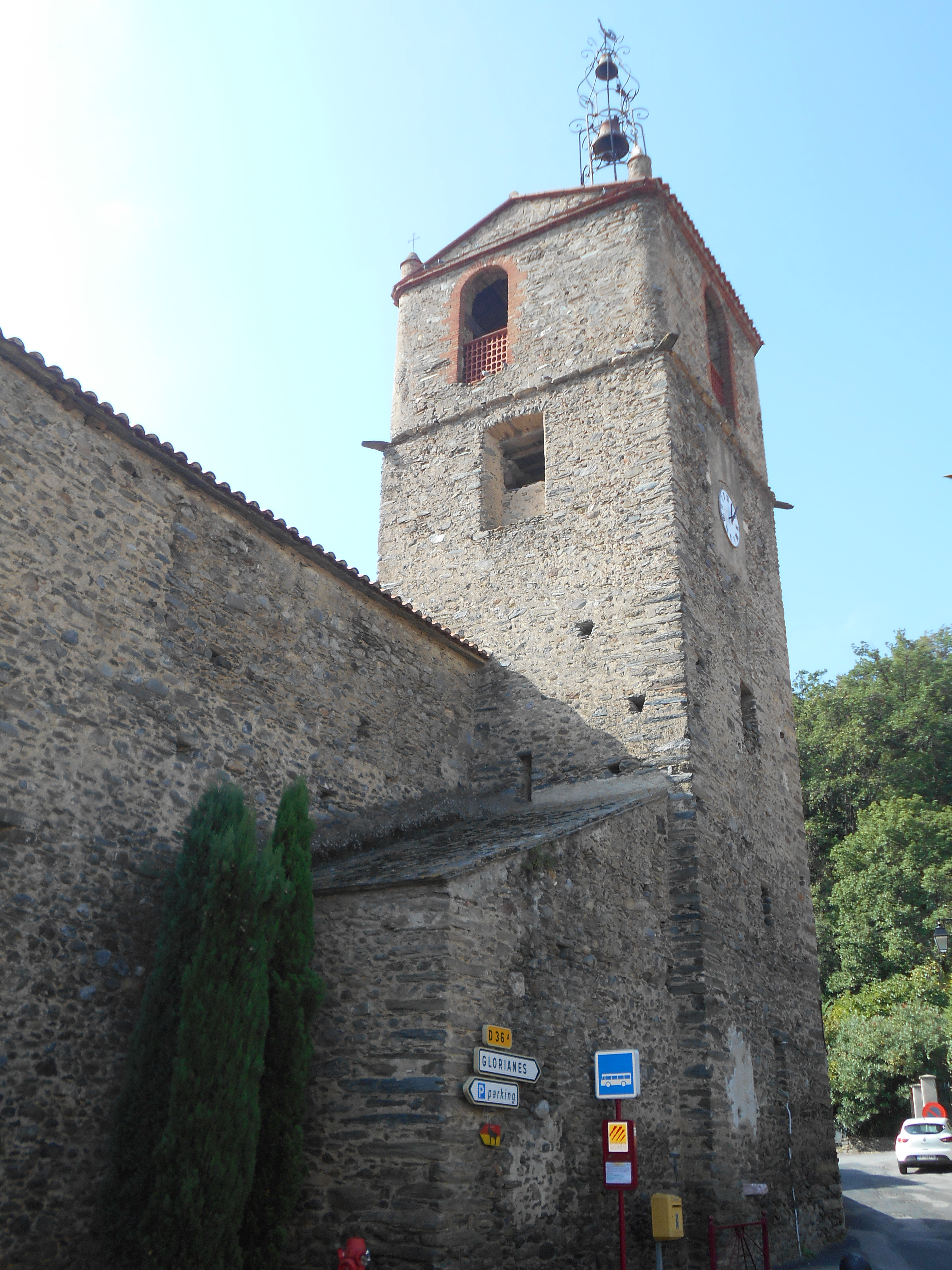 Santa Eulàlia de Rigardà. Façana nord